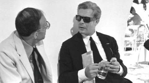 Screenshot del film 8½ (1963)